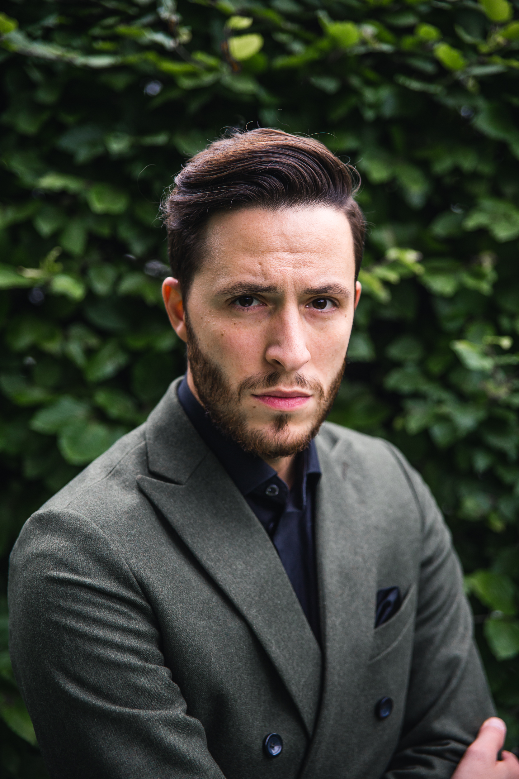 Actor headshot. Picture taken by Alvin Santos